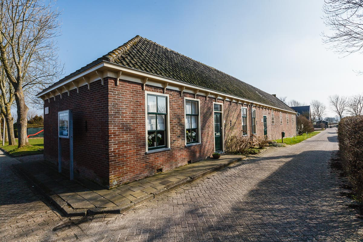 Schuurkerk van Krabbendam, Schagen, Noord Holland, Nederland